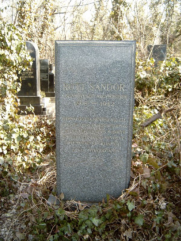 Rott Sándor, Róth Sándor (1868-1942) színész, rendező, igazgató sírja Budapesten. Kozma utcai zsidó temető: 17-1-17.